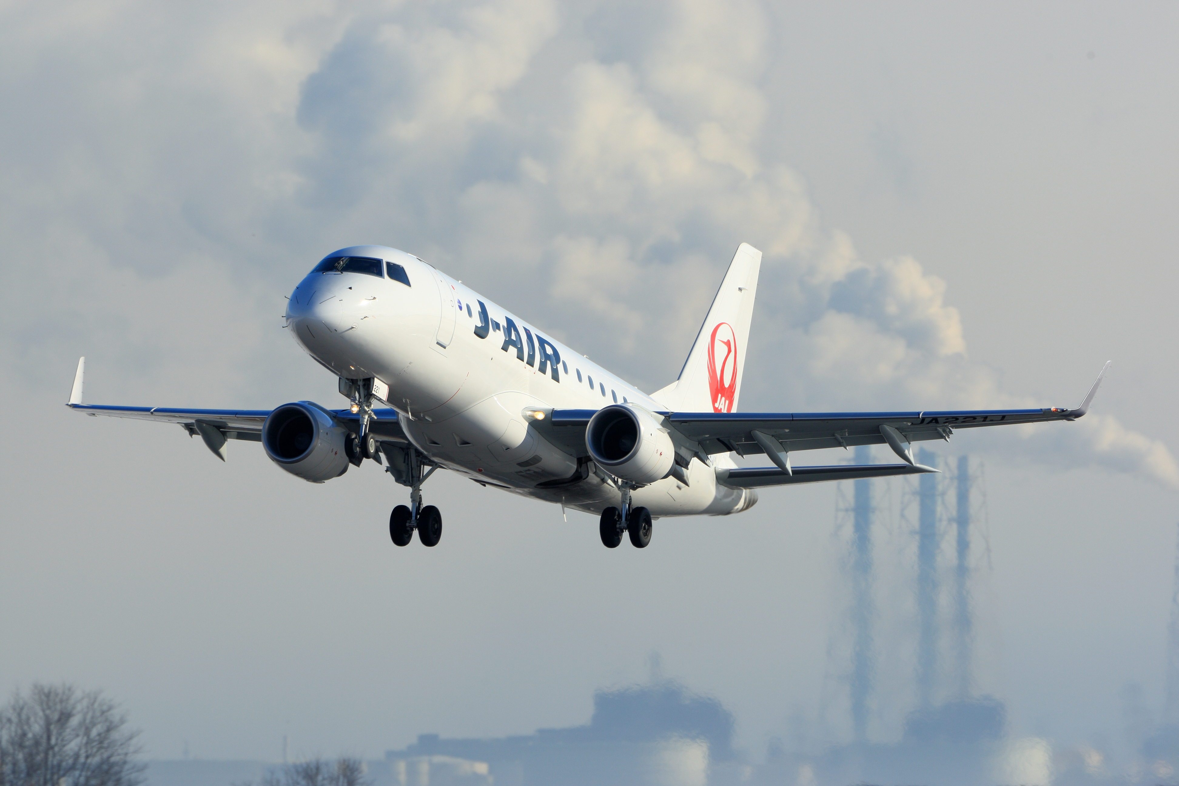 新潟空港で撮影された、J-AIRのE170